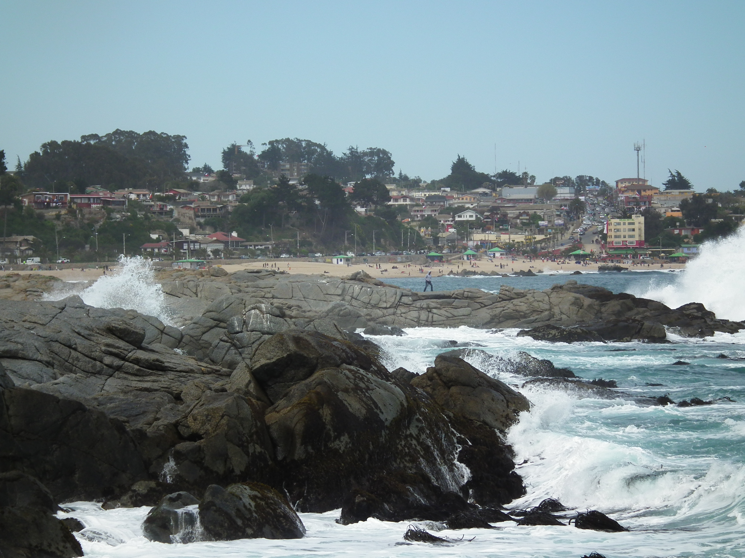 Bahía de El Quisco desde el norte. Al fondo se ve la Casa Dubornais